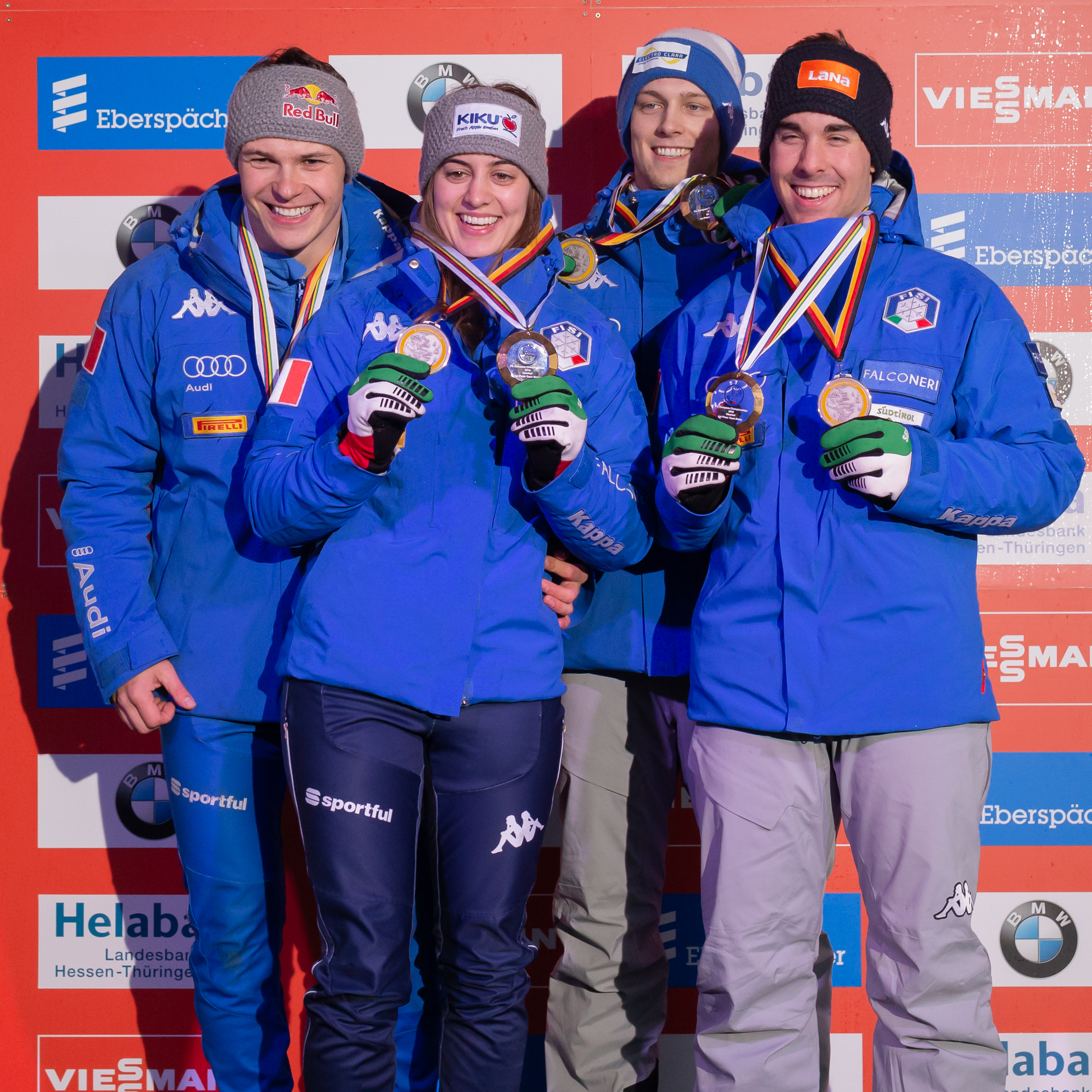 Viessmann Luge World Cup Oberhof; v.li.: Dominik Fischnaller (ITA, Italien), Andrea Voetter (ITA, Italien), Ivan Nagler (ITA, Italien), Fabian Malleier (ITA, Italien) präsentieren ihre Europameisterschafts- und Weltcupmedaillen in der Teamstaffel; Flower Ceremony, Blumenzeremonie, Siegerehrung; Jubel, celebration